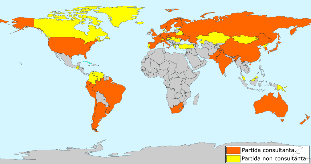 Estats signataris dau Tractat Antartic en 2016.